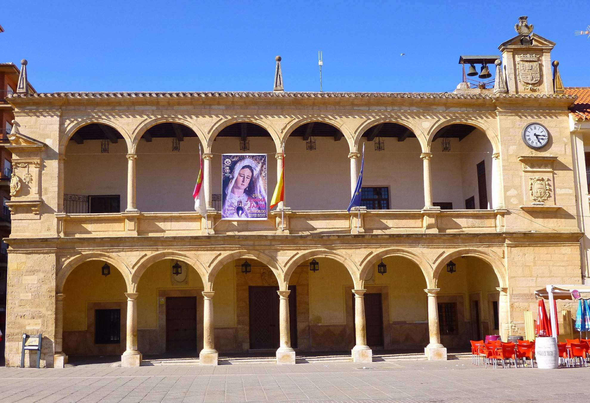 Casa Consistorial de Villarrobledo (Albacete)